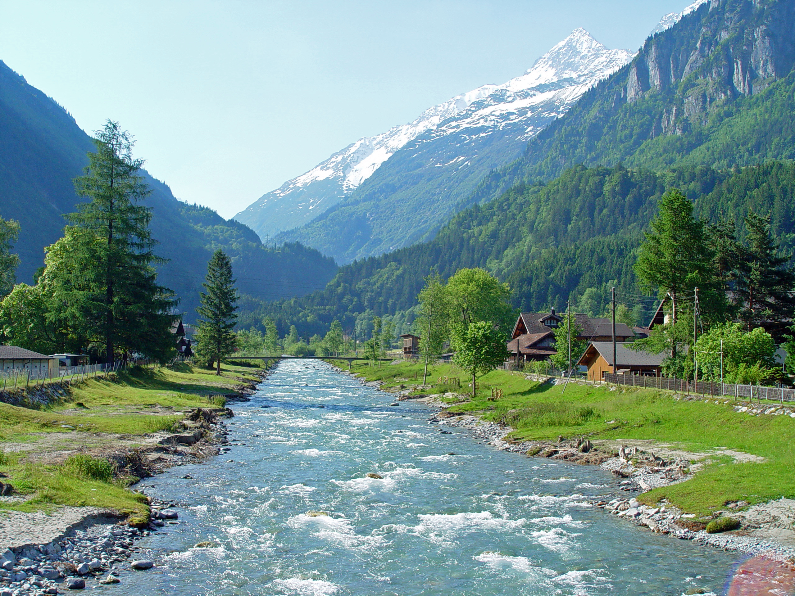 Aare bei Innertkirchen